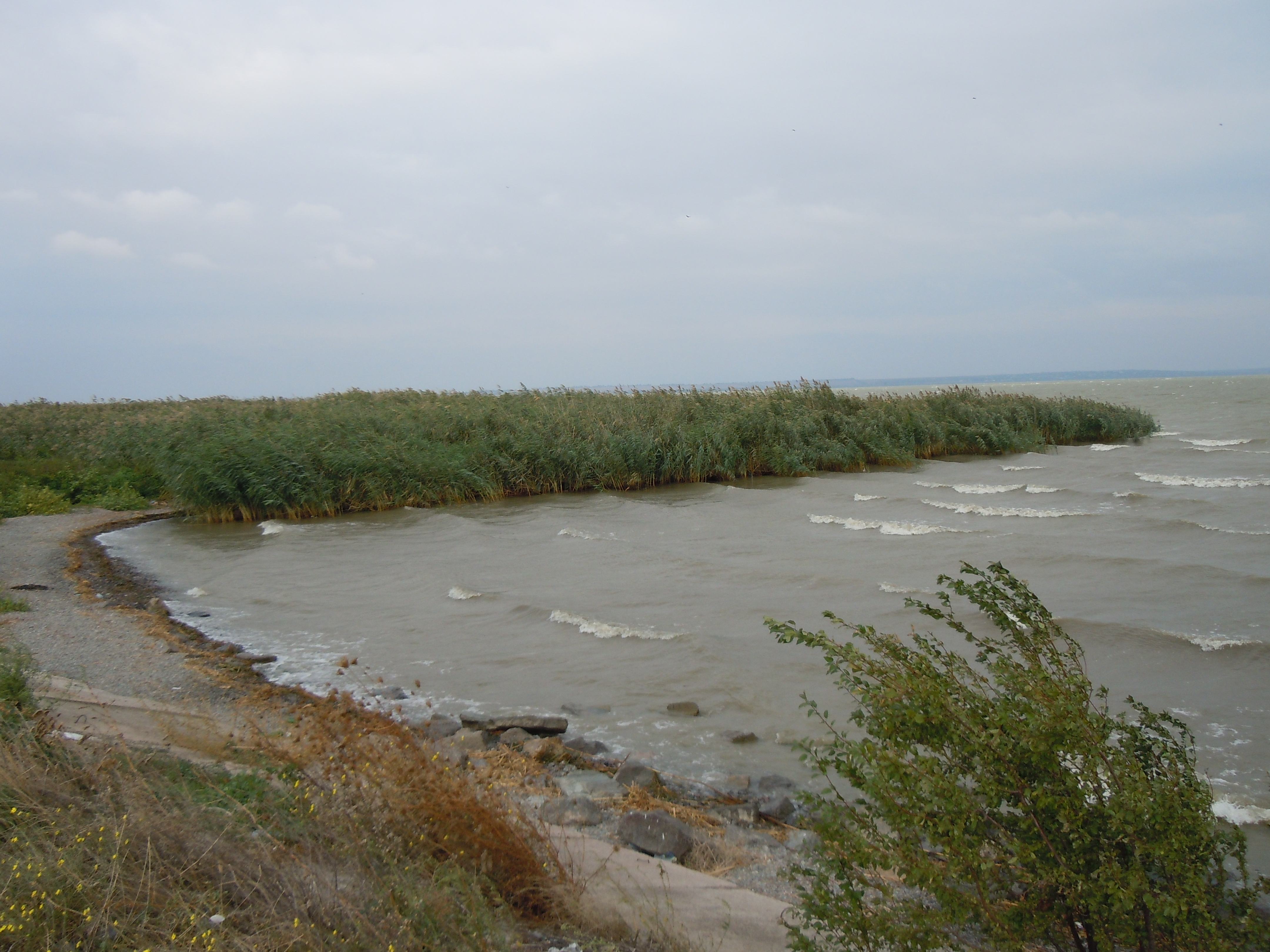 Південне узбережжя озера Ялпуг